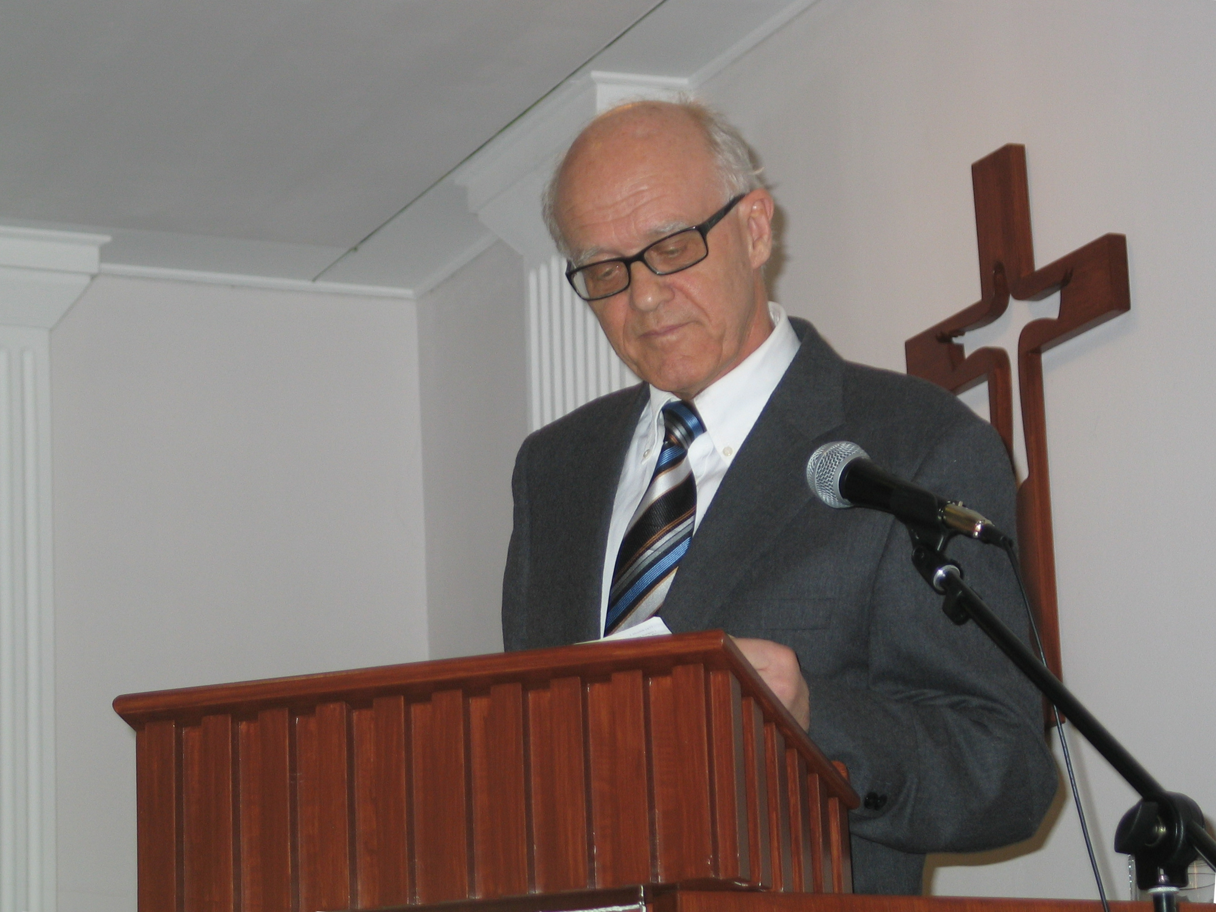 Seth Erlandsson talar i Biblion i Vasa, Finland.